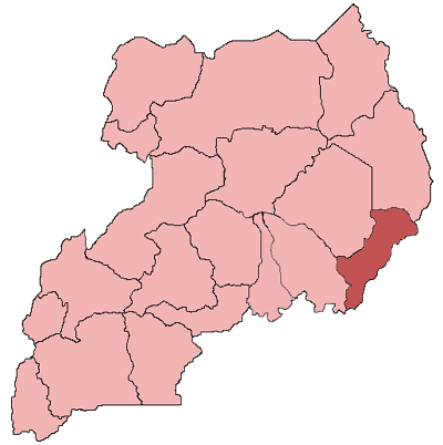 Mappa dell'arcidiocesi cattolica di Tororo, in Uganda. Lavoro personale, eseguito a partire da questa immagine di Commons. Fonte per i confini delle diocesi: Guida delle missioni cattoliche 2005, a cura della Congregatio pro gentium evangelizatione, Roma, Urbaniana University Press, 2005. Categoria:Chiesa cattolica in Uganda